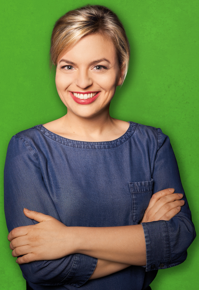 Katharina Schulze